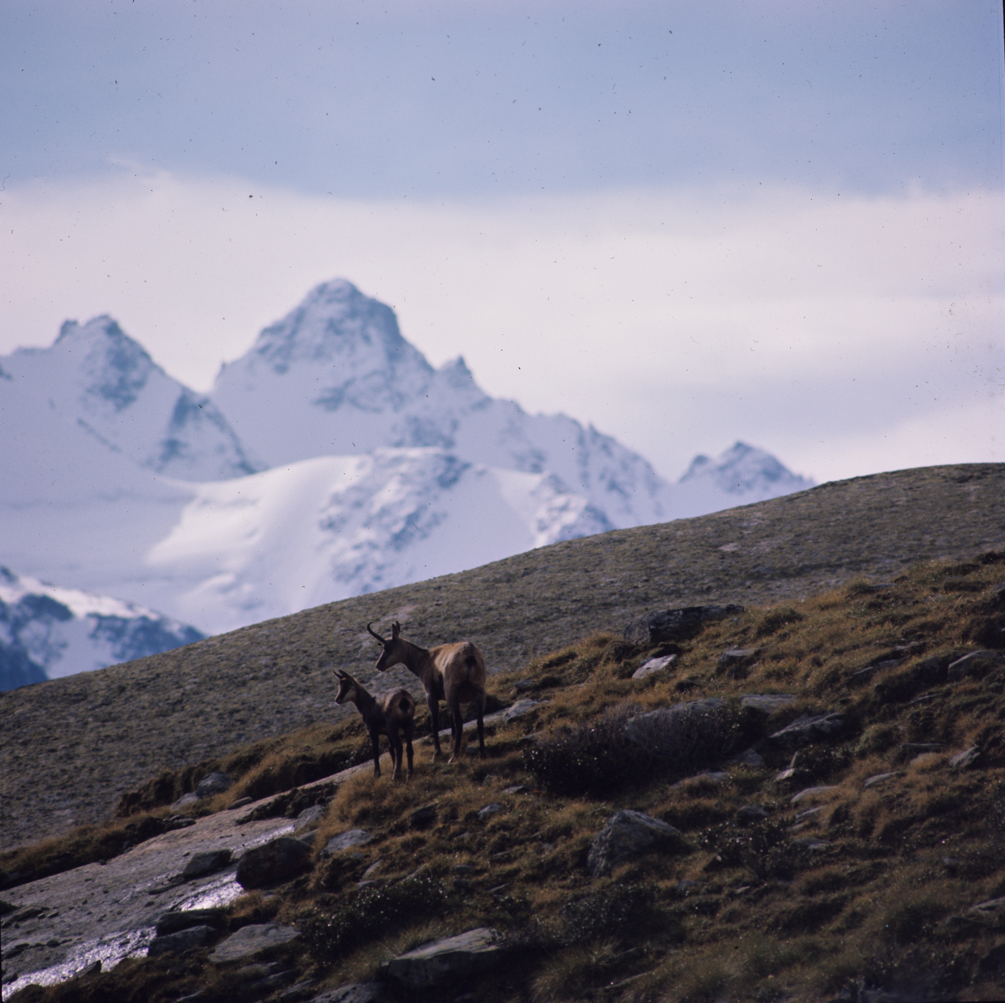 Fotografia realizzata nel contesto del progetto LIFE PastorAlp